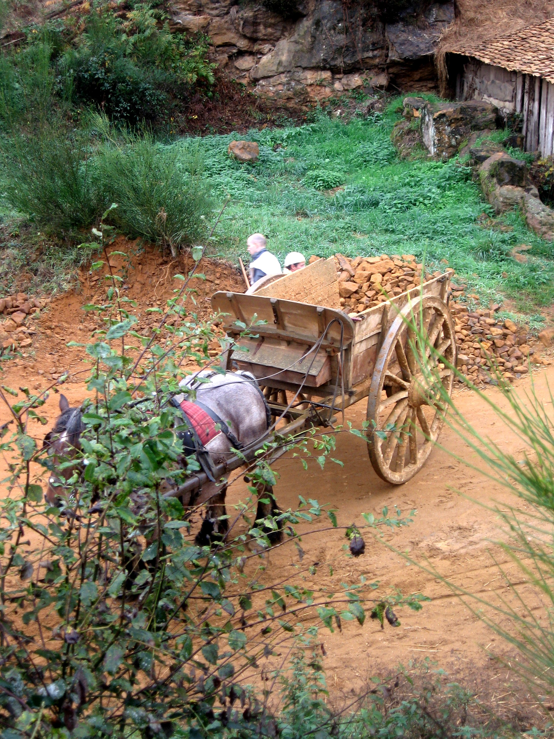 Carriole à Guédelon.